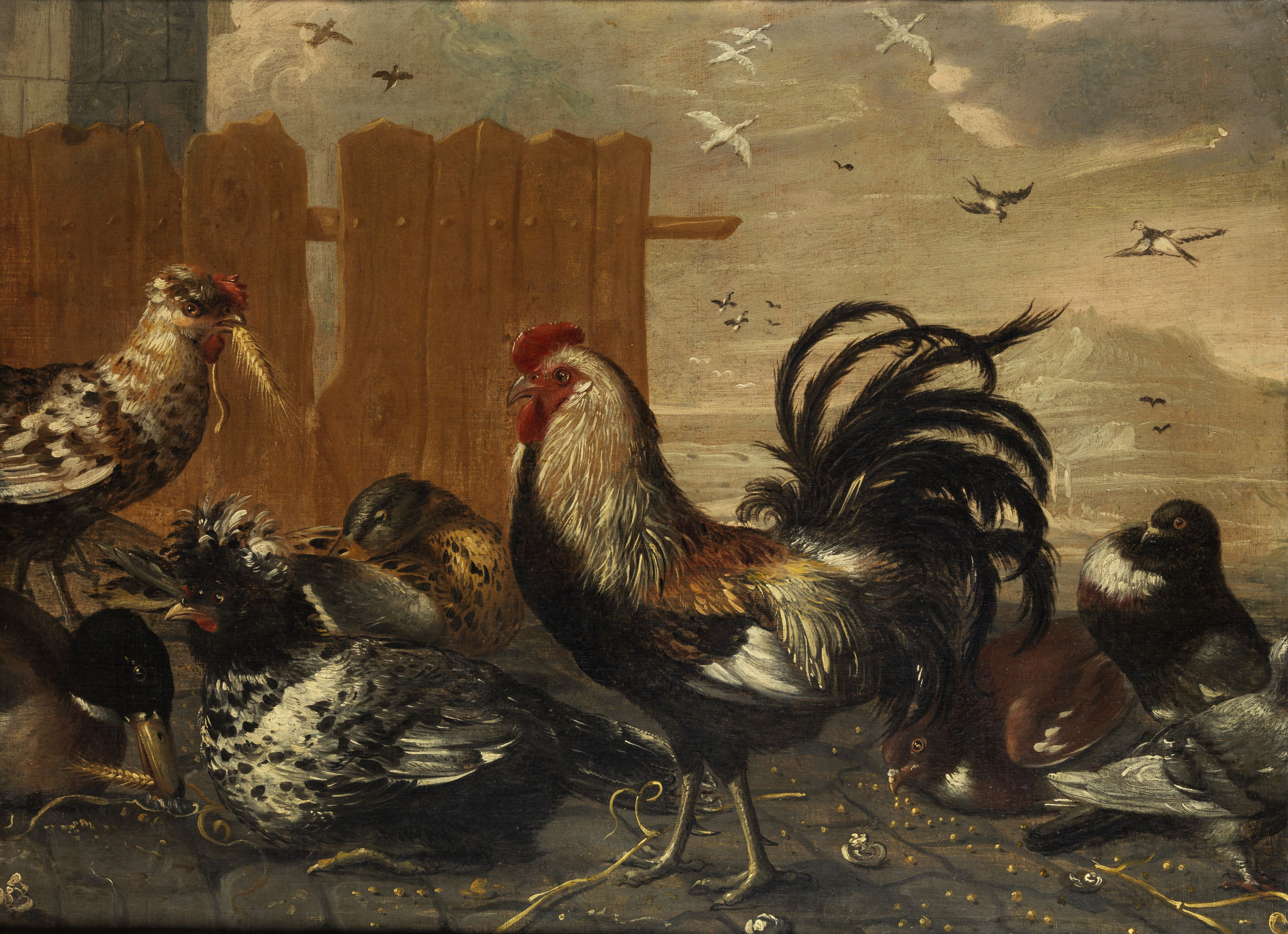 Hahn im Hühnerhof. Flämischer Meister des 17. Jahrhunderts. Öl auf Leinwand. 77 x 106 cm.